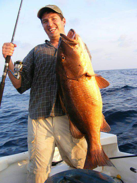 Pesca Deportiva en Costa Rica / Pescador: Andrés Vega